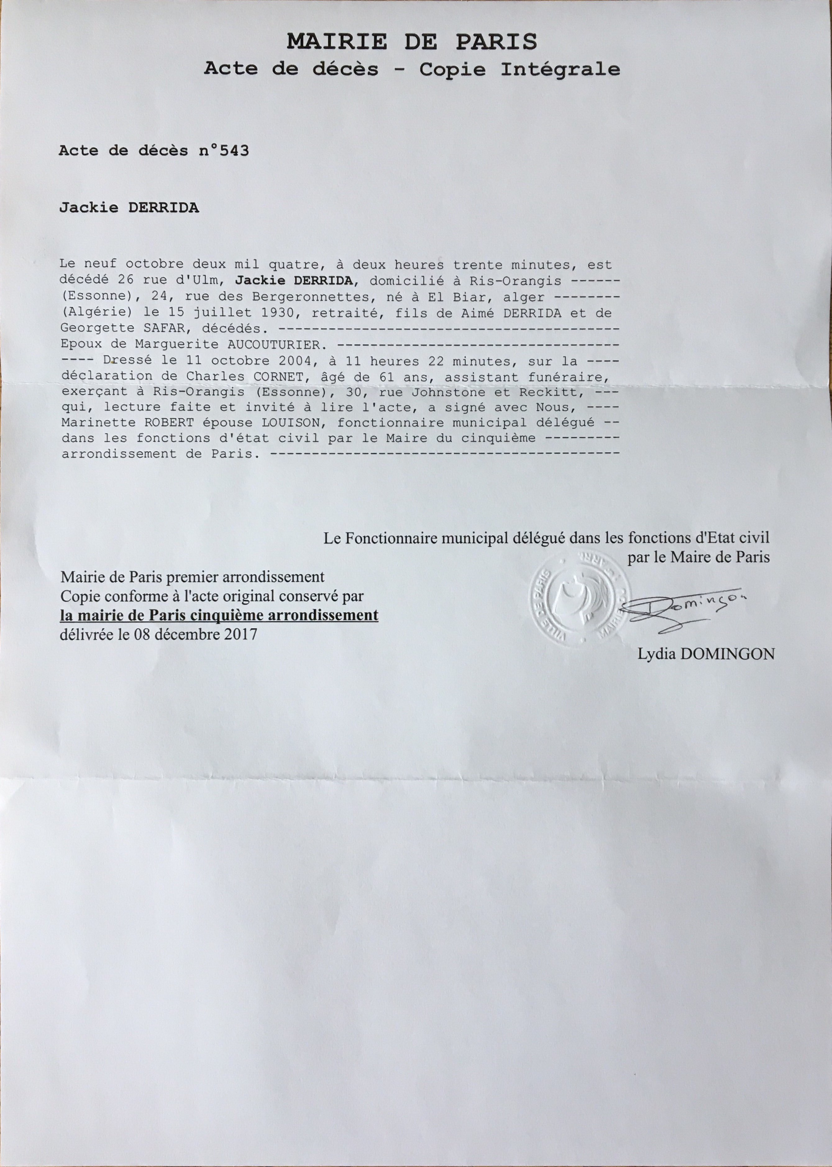 Acte de décès de Jacques (Jackie) Derrida délivré par la mairie du premier arrondissement de Paris le 8 décembre 2017 et certifiant qu'il est bien mort le 9 octobre 2004.